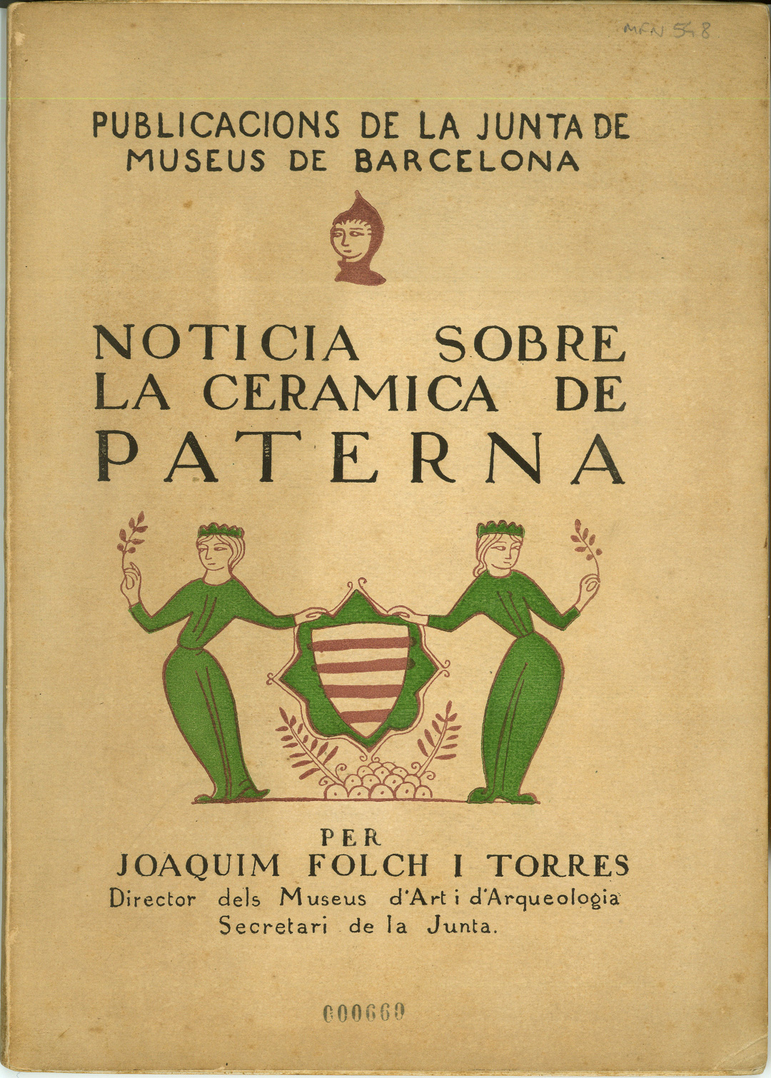 Portada del llibre Notícia sobre la ceràmica de Paterna, 1921, Editat per Publicacions de Museus, Barcelona.